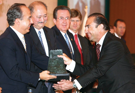 Eugenio Baeza Fares